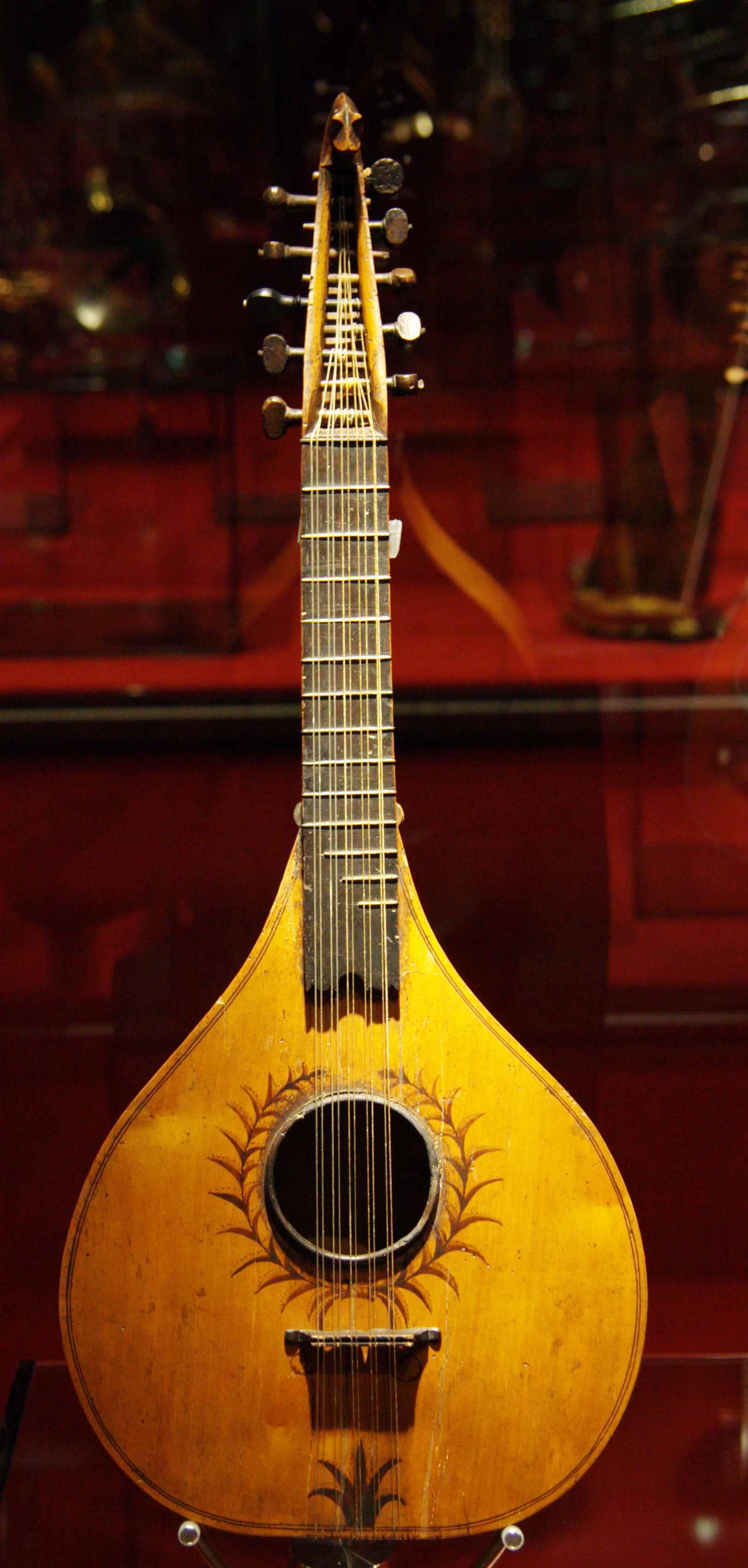 Instruments al Museu de la Música de Barcelona. Fotografies fetes durant el Backstage pass, el 21-11-2013